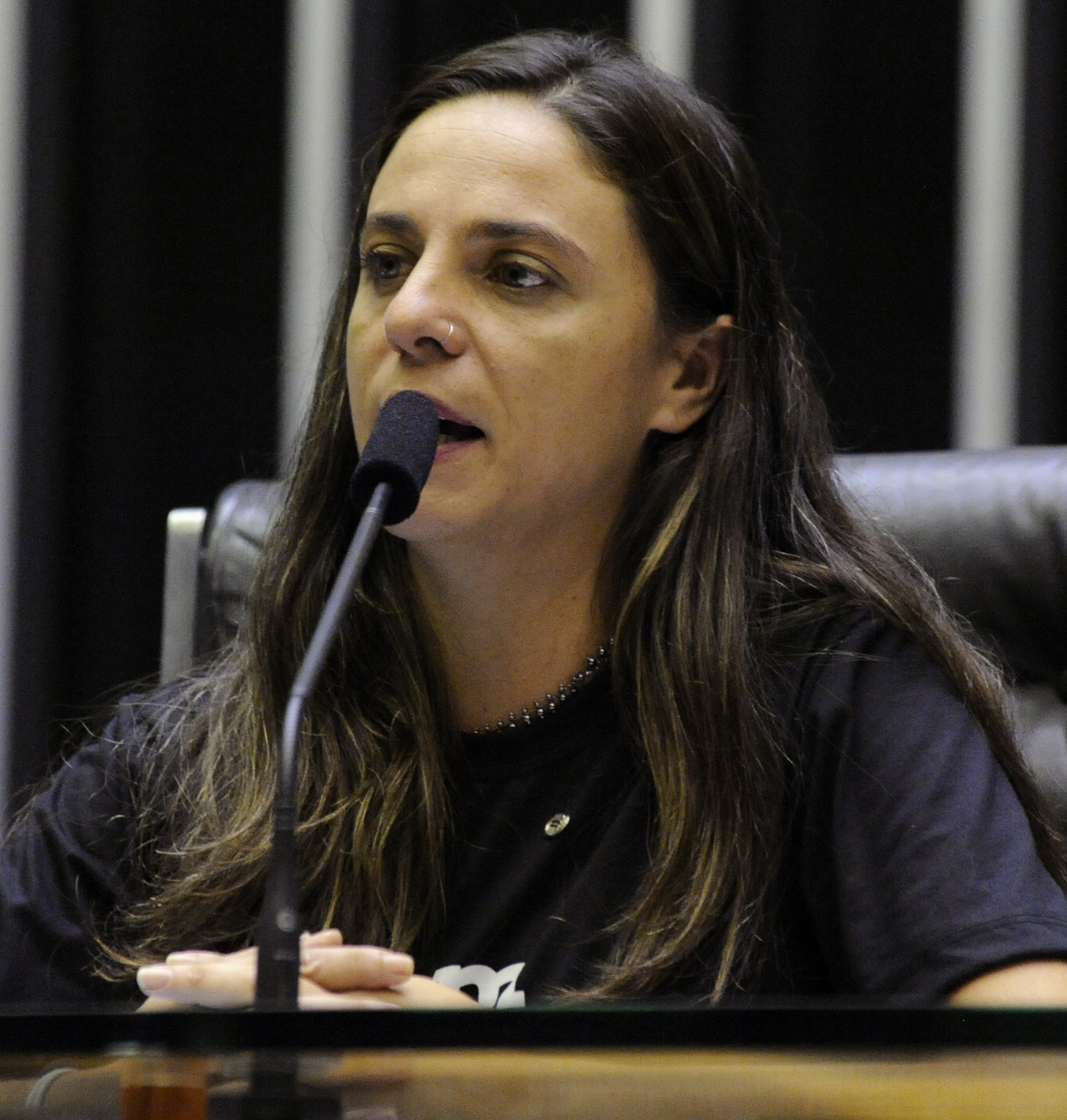 Fernanda Melchionna em março de 2019.